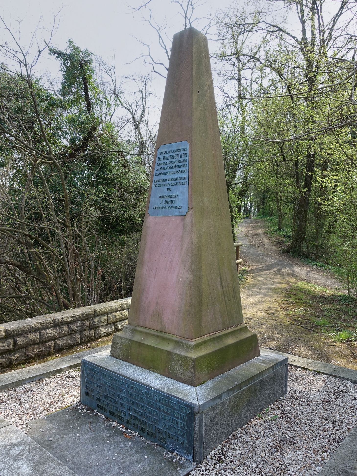 Hülftenschanz Denkmal Inschrift: Auf diesem Platze fiel Dr. Heinrich Hug Obergerichtsschreiber. Im Tode Ehrenbürger des Kantons Basellandschaft. Die Freiheit war seine Braut für sie ging er gerne in den Tod. Weiter viel hier. Am Hülftenschanz Denkmal Sockel ist folgende Inschrift zu sehen. An dieser Stelle brach Samstag den 3. August 1833 um die Mittagszeit der Ansturm der Basler Standestruppe unter blutigen Verlusten zusammen. Jhren Sieg nützen die Landschäftler Schützen durch rücksichtsloses Verfolgen des geschlagenen Gegners bis an die Birs aus.